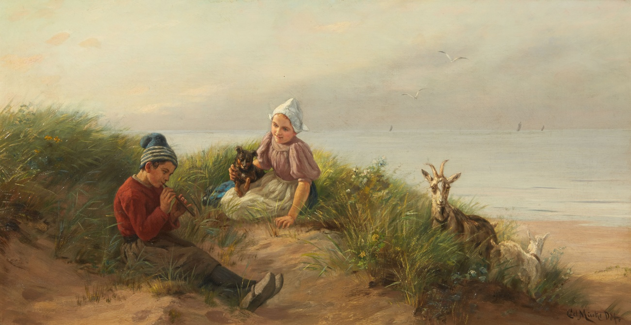 Spielende Kinder am Strand mit Hund und Ziegen. Öl auf Leinwand. 39 x 76 cm. Signiert unten rechts: Carl Mücke Ddf. (Düsseldorf)